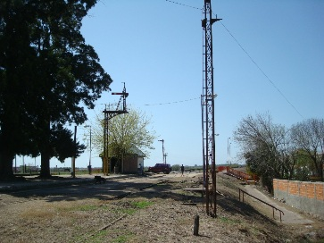 Vías en la Estación Ringuelet